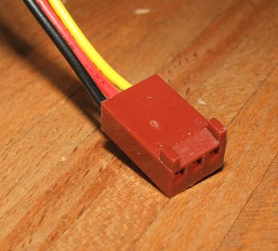 Molex femmina a 3 pin di una comune ventola tachimetrica.